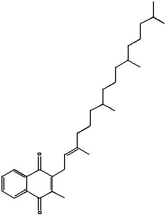 Vitamina K